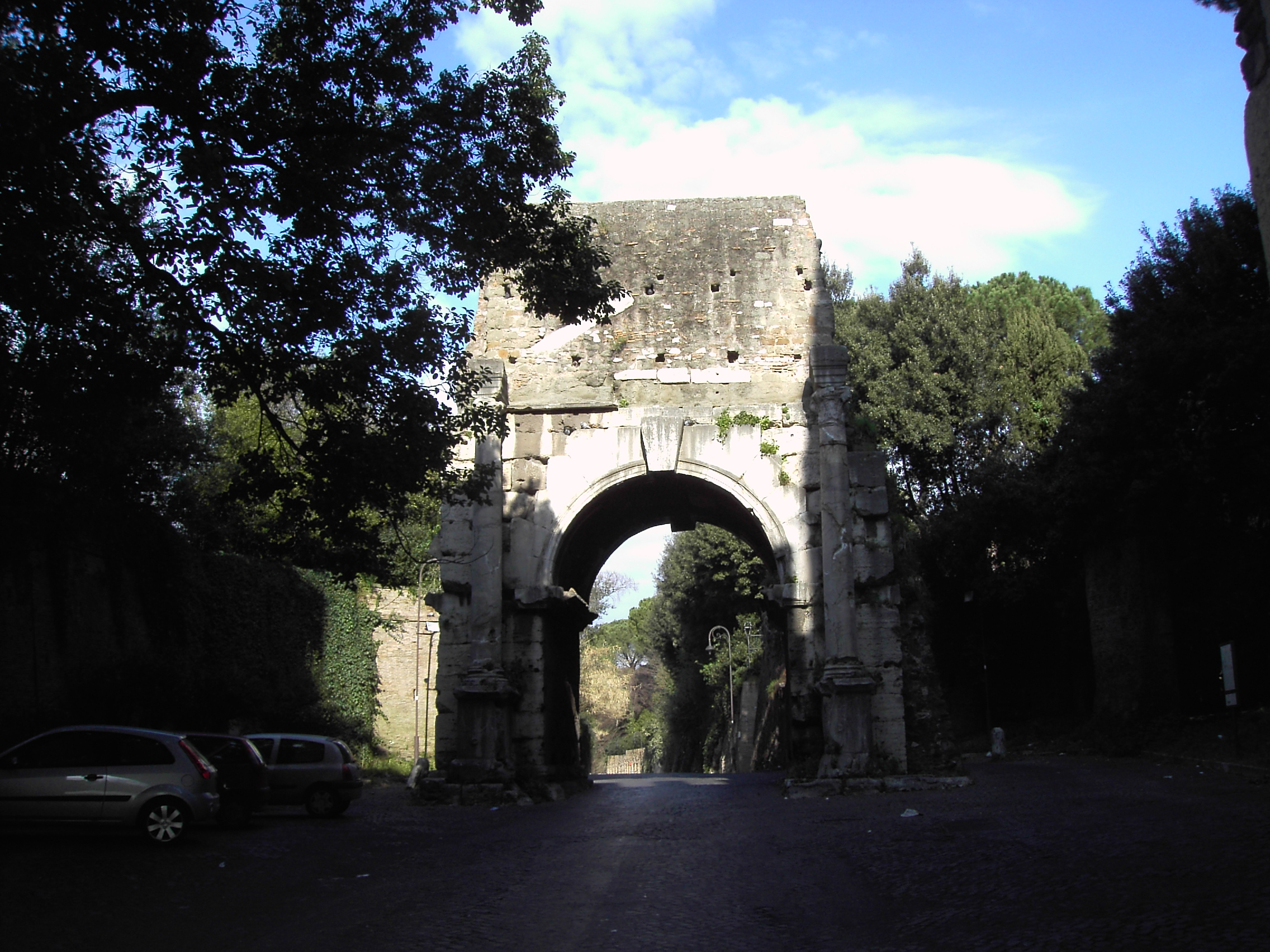 Roma , via Appia Antica: Arco di Druso